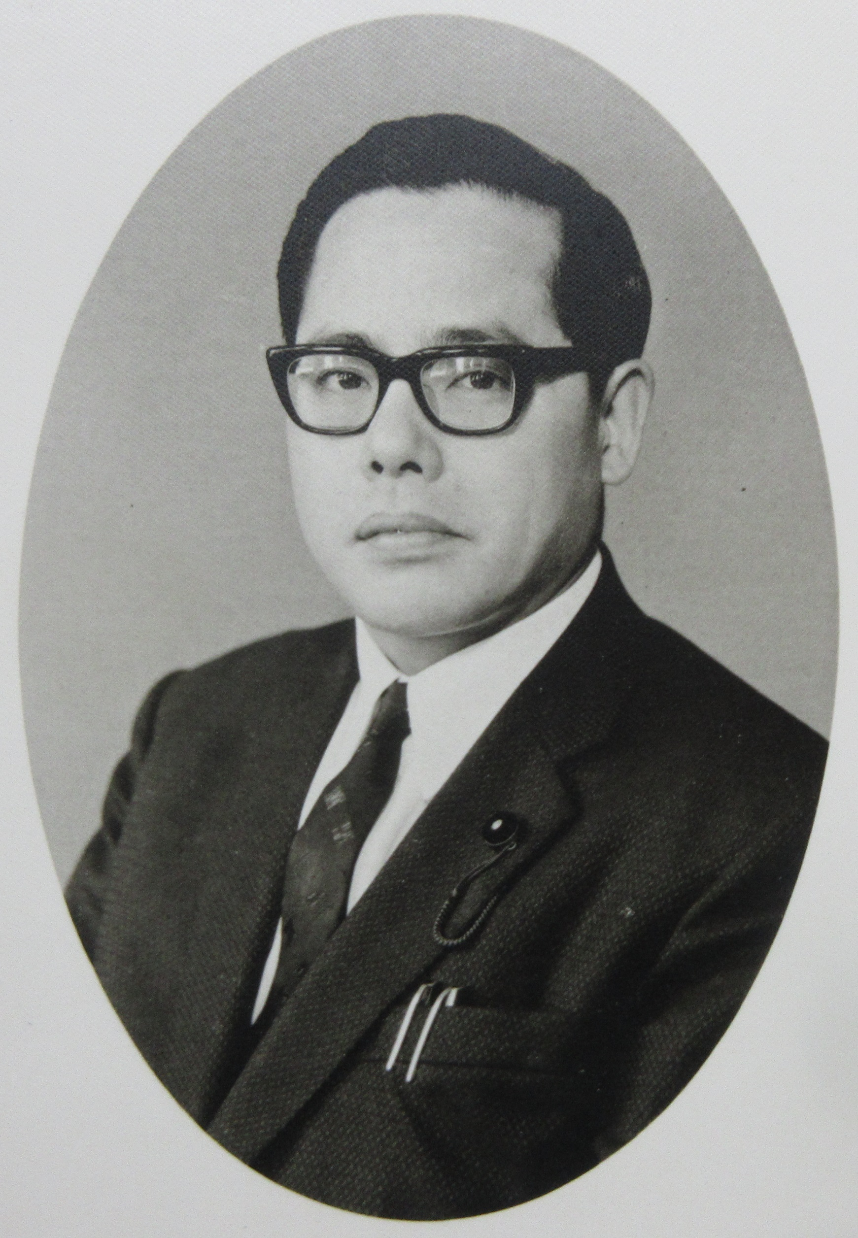 内田喜久。1925年生まれ。元愛知県岡崎市長。